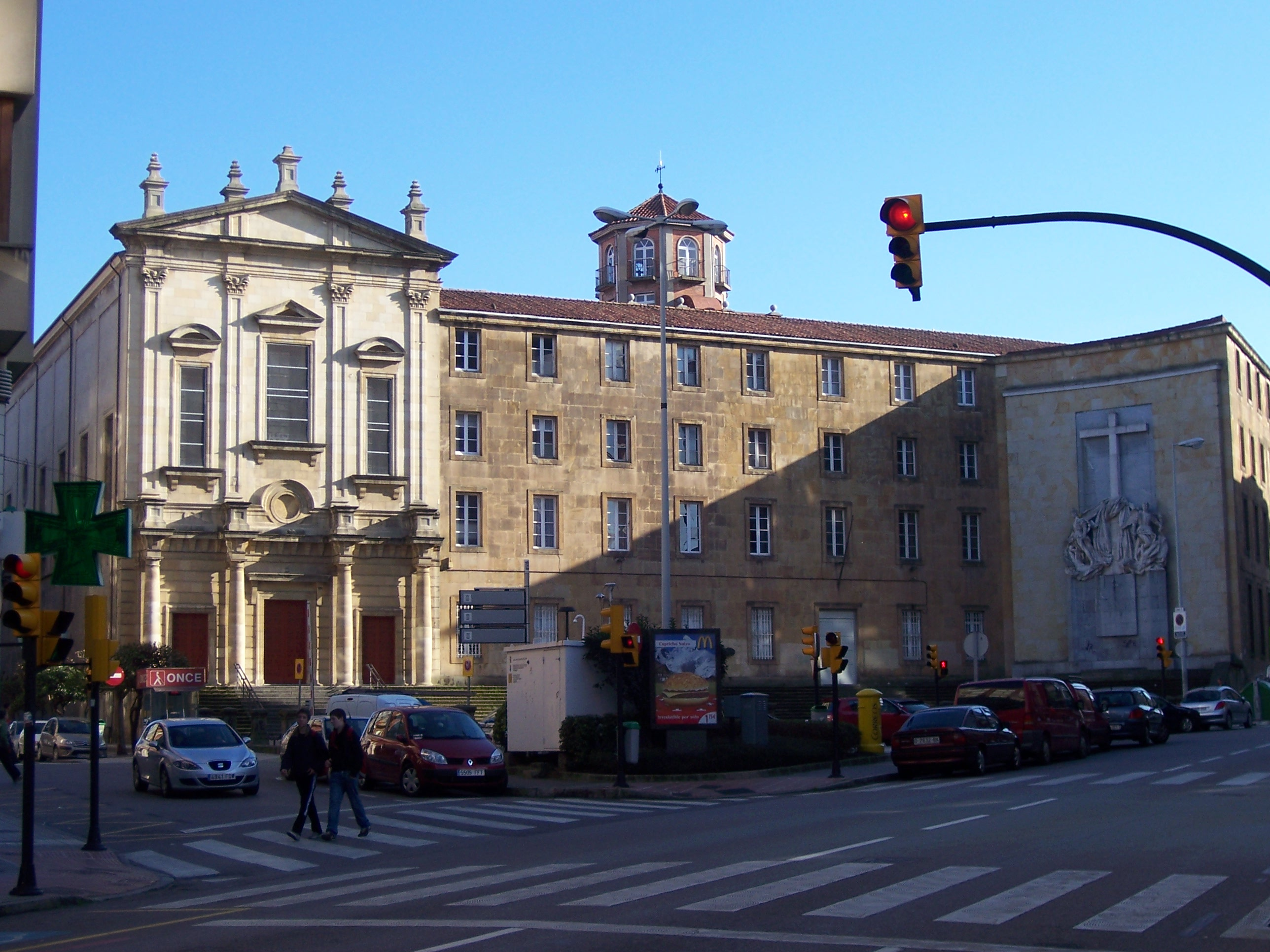 Main building, Colegio de la Inmaculada (Gijón)